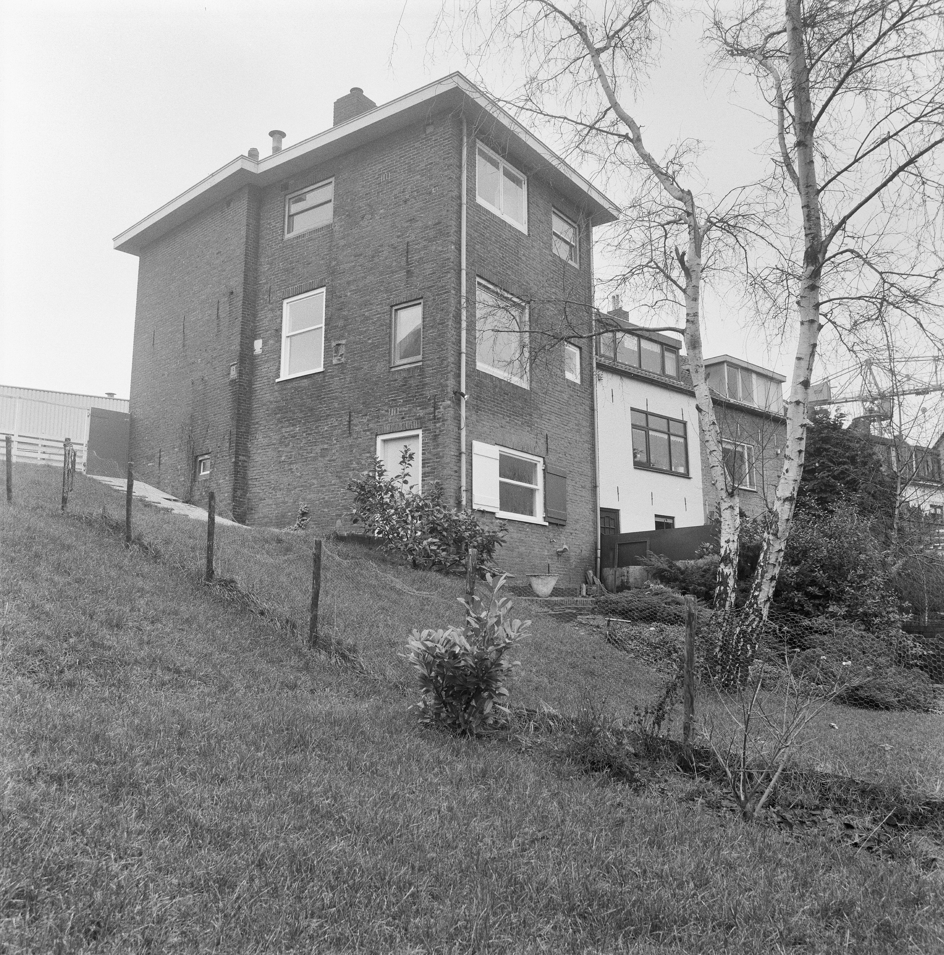 'Huis van Zessen', ontworpen door Cornelis van Eesteren; bouwjaar 1923. Exterieur OVERZICHT RECHTERZIJGEVEL, ACHTERGEVEL